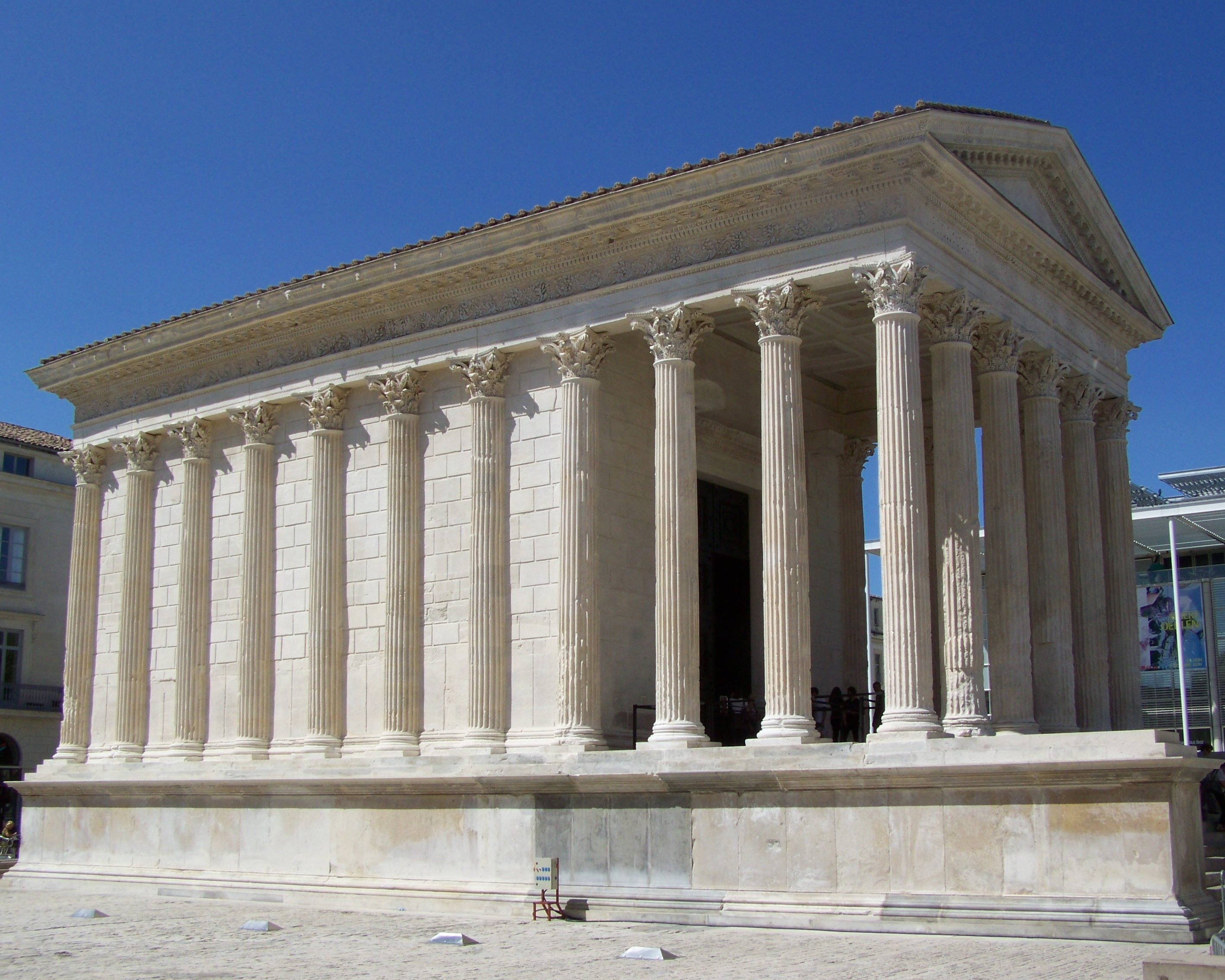 Nîmes (Gard, France), temple romain dit "la Maison Carrée".